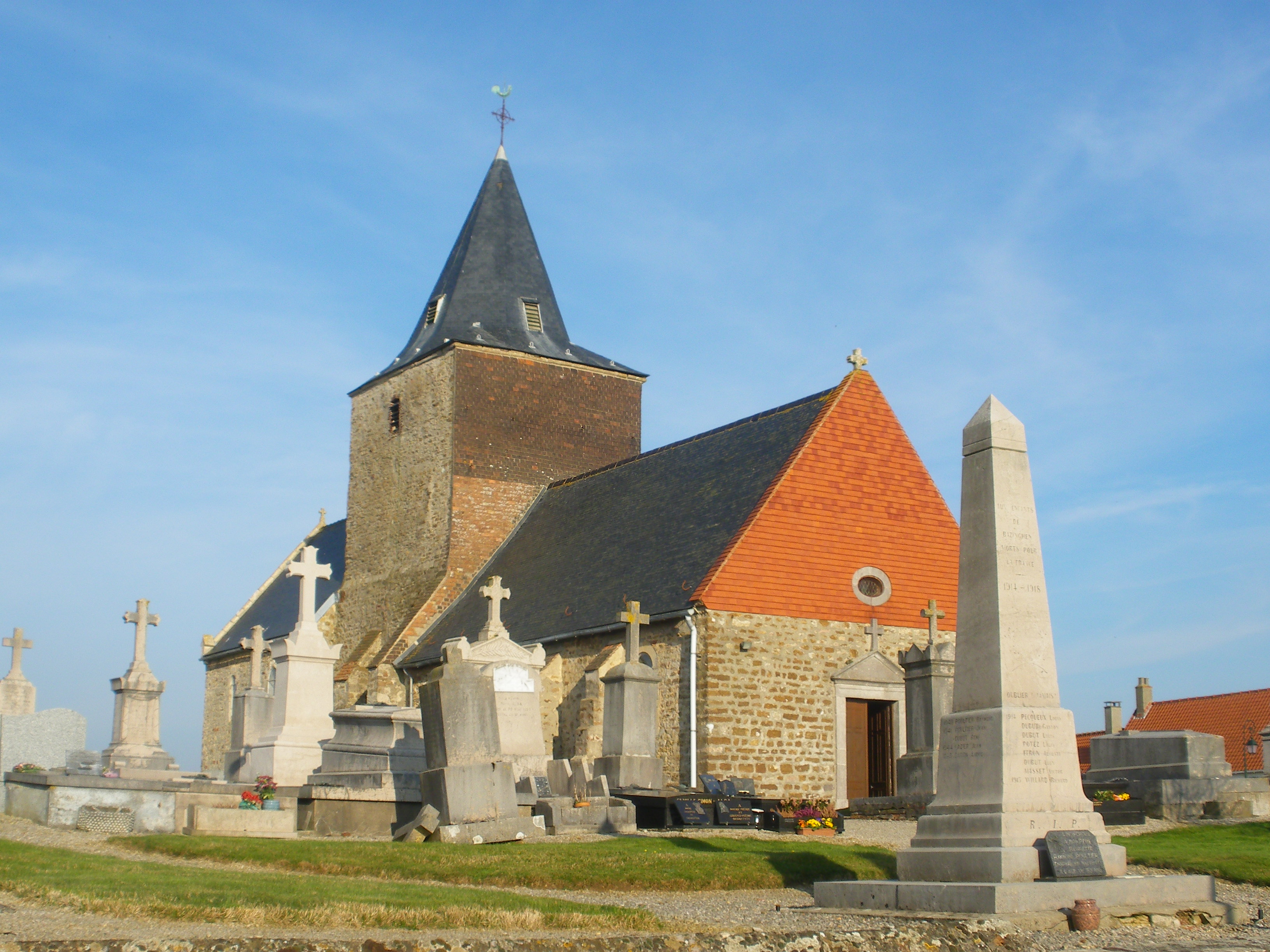 Vue de l'église Saint-Eloi et du monument aux morts de Bazinghen.